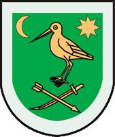 Герб Куликівського району